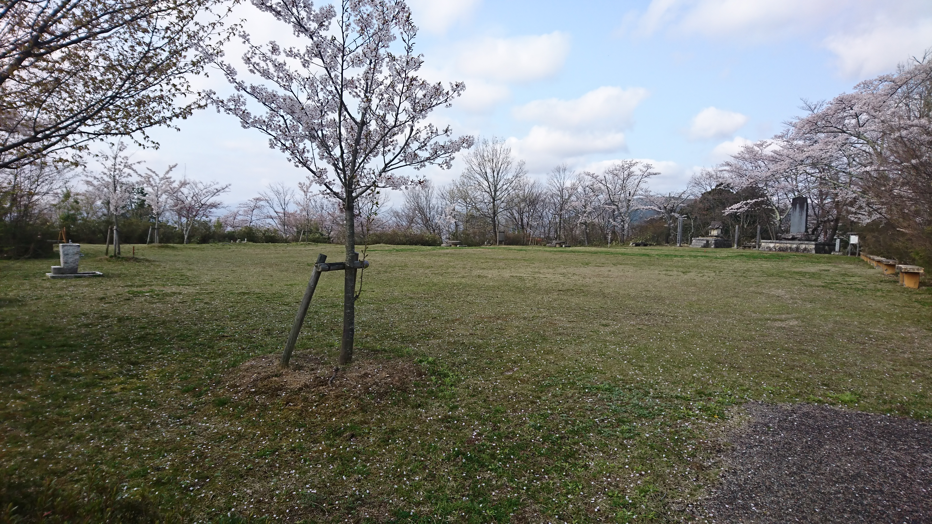 舘の山公園山頂（春）